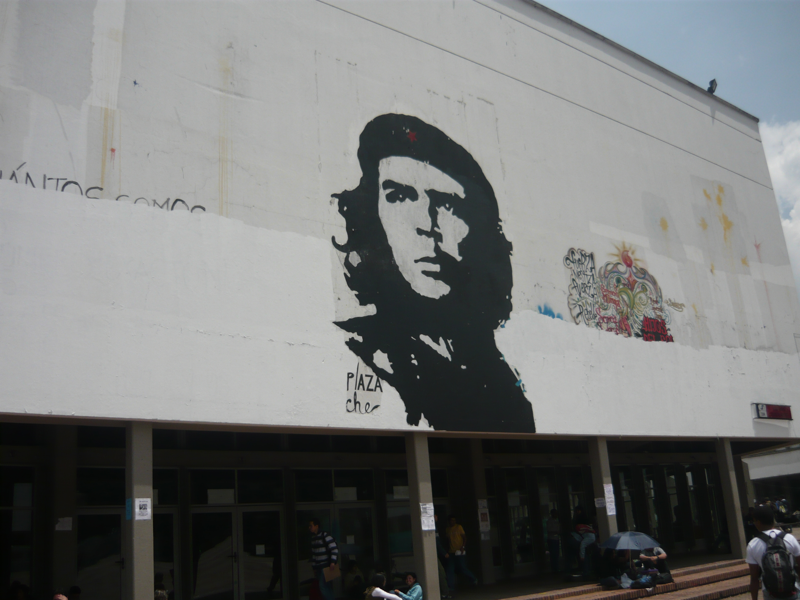 Auditorio Leon de Greiff, Universidad Nacional de Colombia